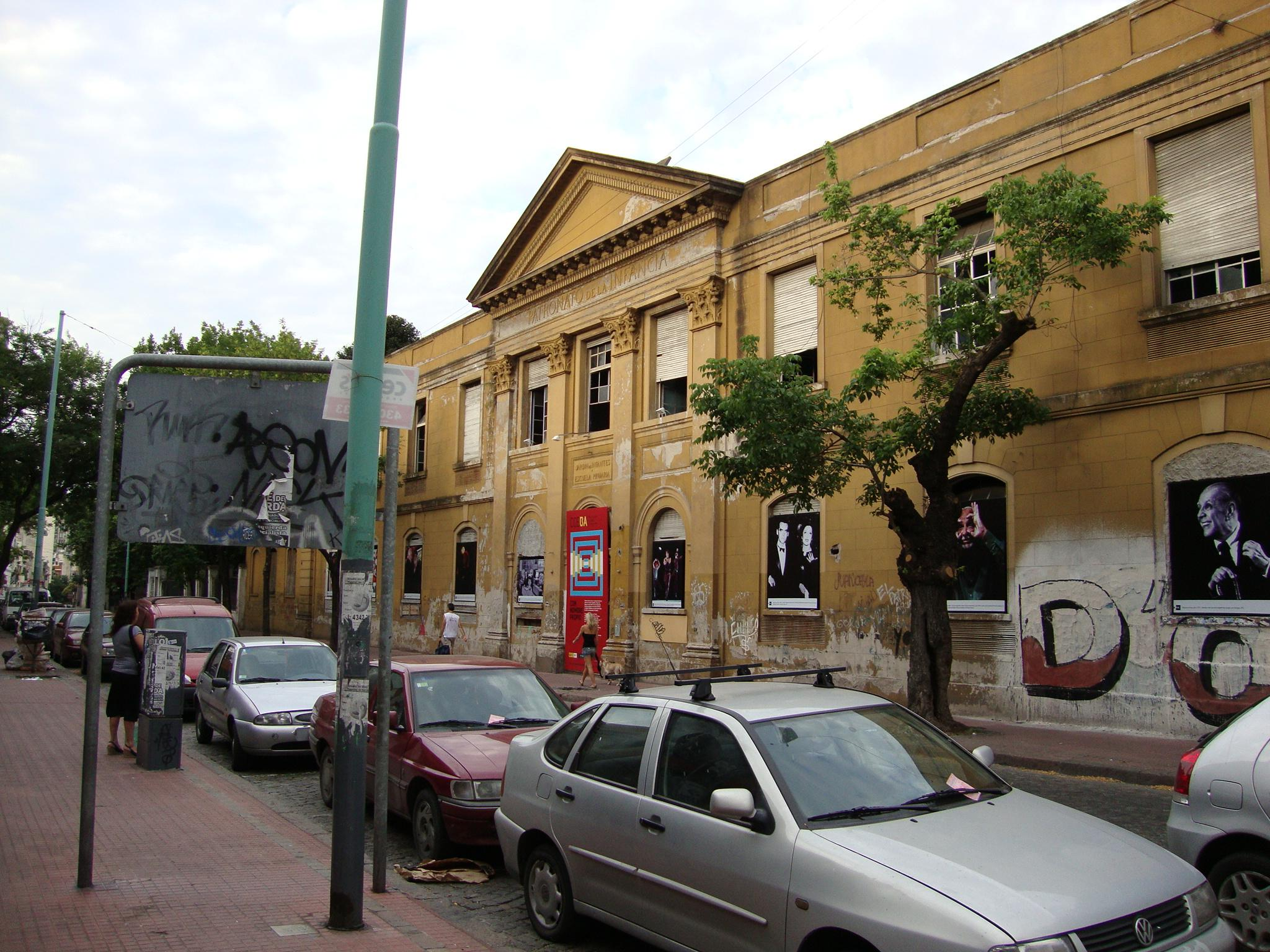 Edificio de la Escuela Primaria y Jardín de Infantes del Patronato de la Infancia, construido en 1897 con proyecto de Juan Antonio Buschiazzo. Estuvo abandonado por años y se planea transformarlo en un centro cultural de España. Avenida San Juan y Balcarce, barrio de San Telmo, ciudad de Buenos Aires, Argentina.